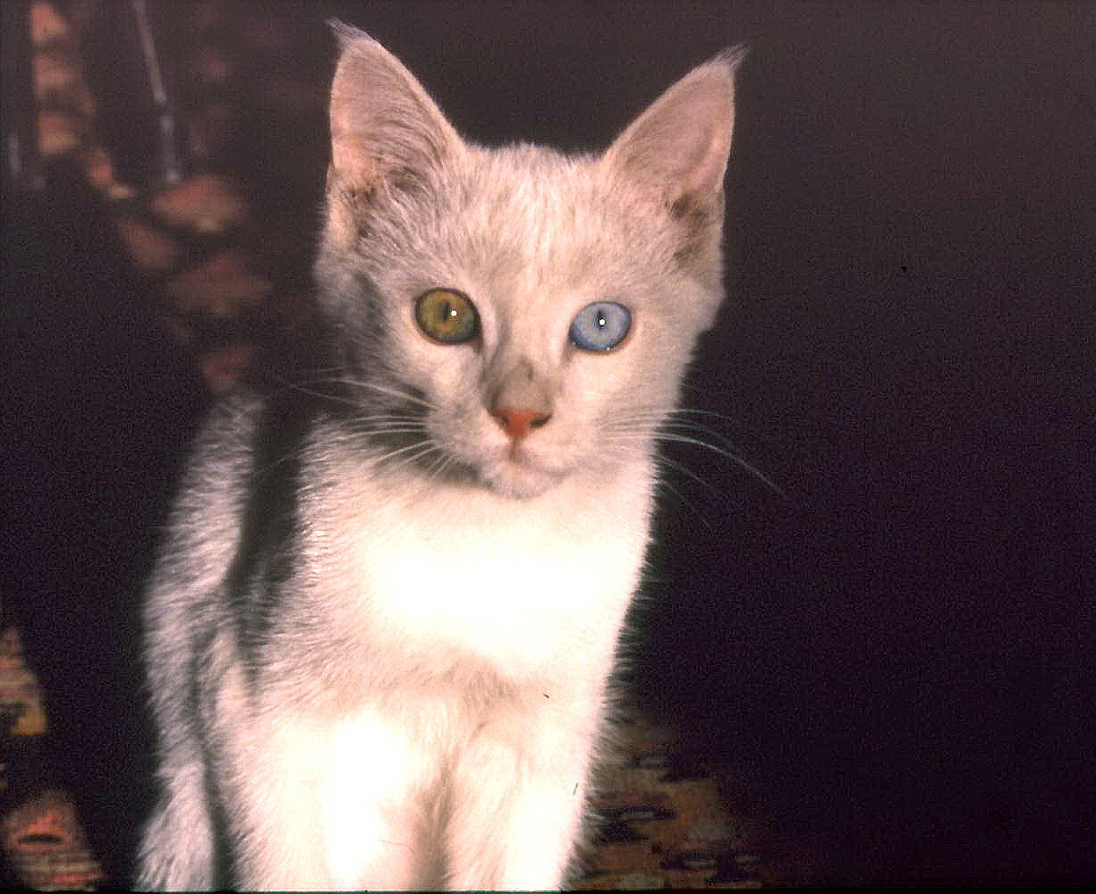 Jeune chat aux yeux vairons de la région de Van en Turquie orientale